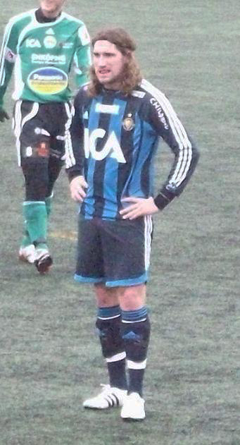 Jan Tauer, Djurgårdens IF Fotboll during a match between Djurgården and Enköping.